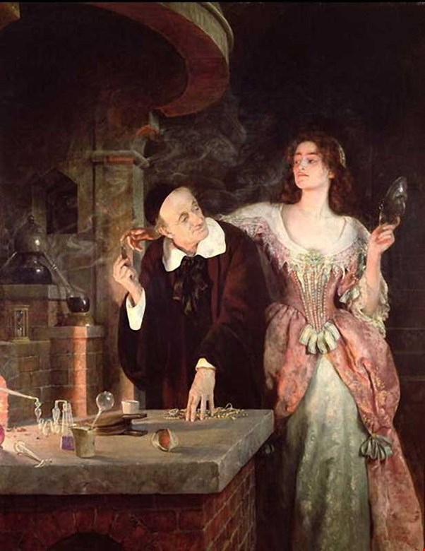 titre : Le laboratoire date : 1895